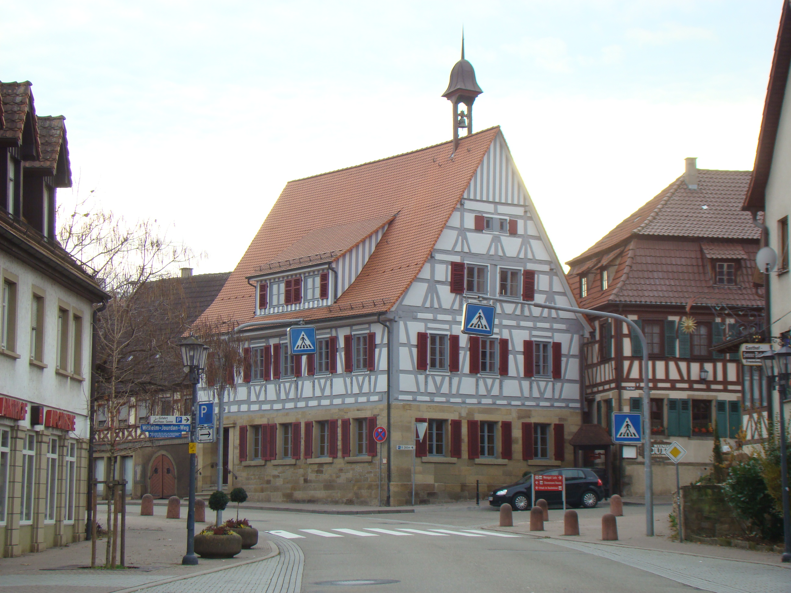 Oberderdingen, Fachwerkgebäude